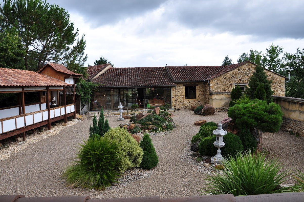 Ho Sho Ji - Temple Zen du "Pic Lumineux"